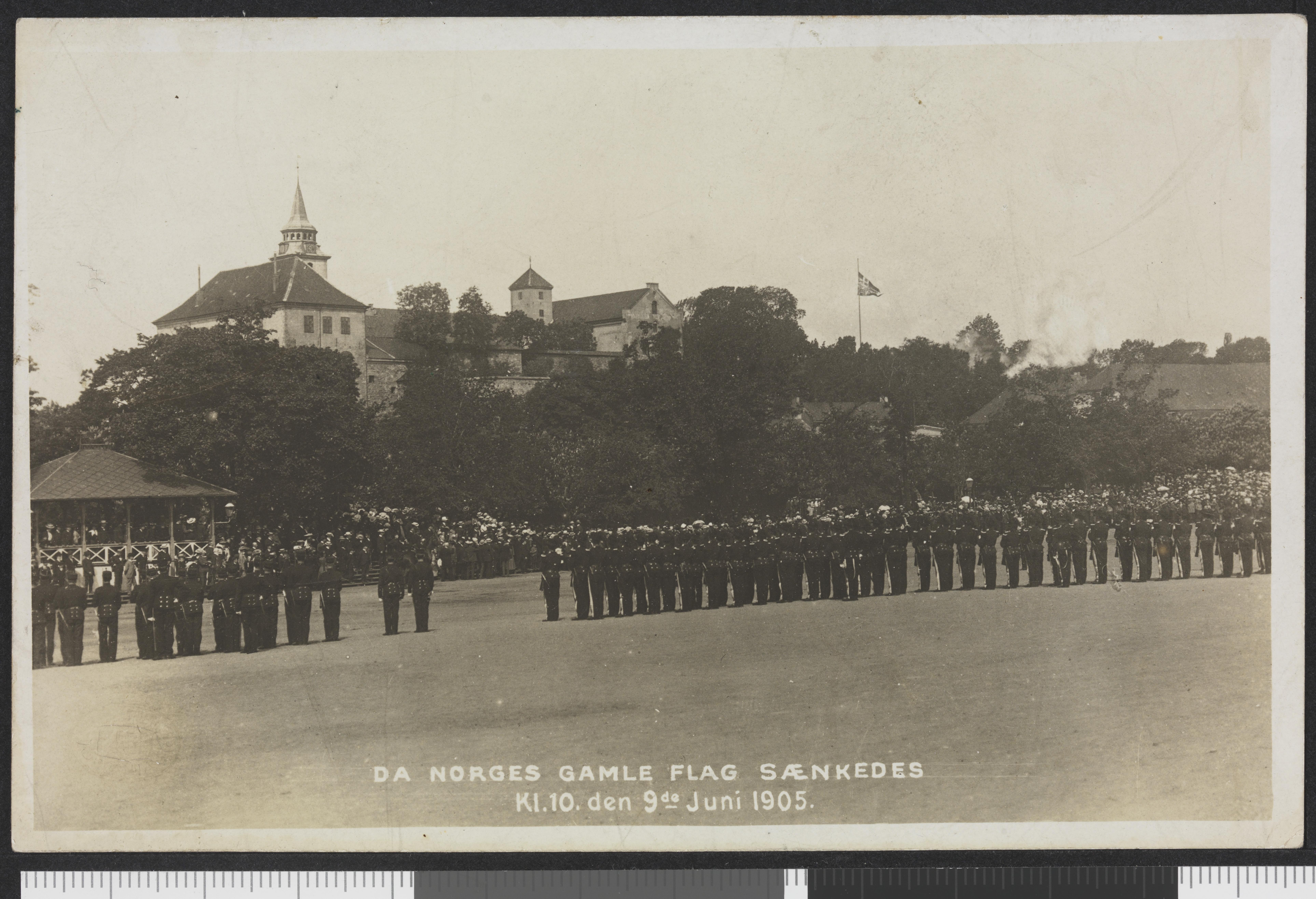 Bildet er hentet fra Nasjonalbibliotekets bildesamling Akershus festning, Oslo, Oslo